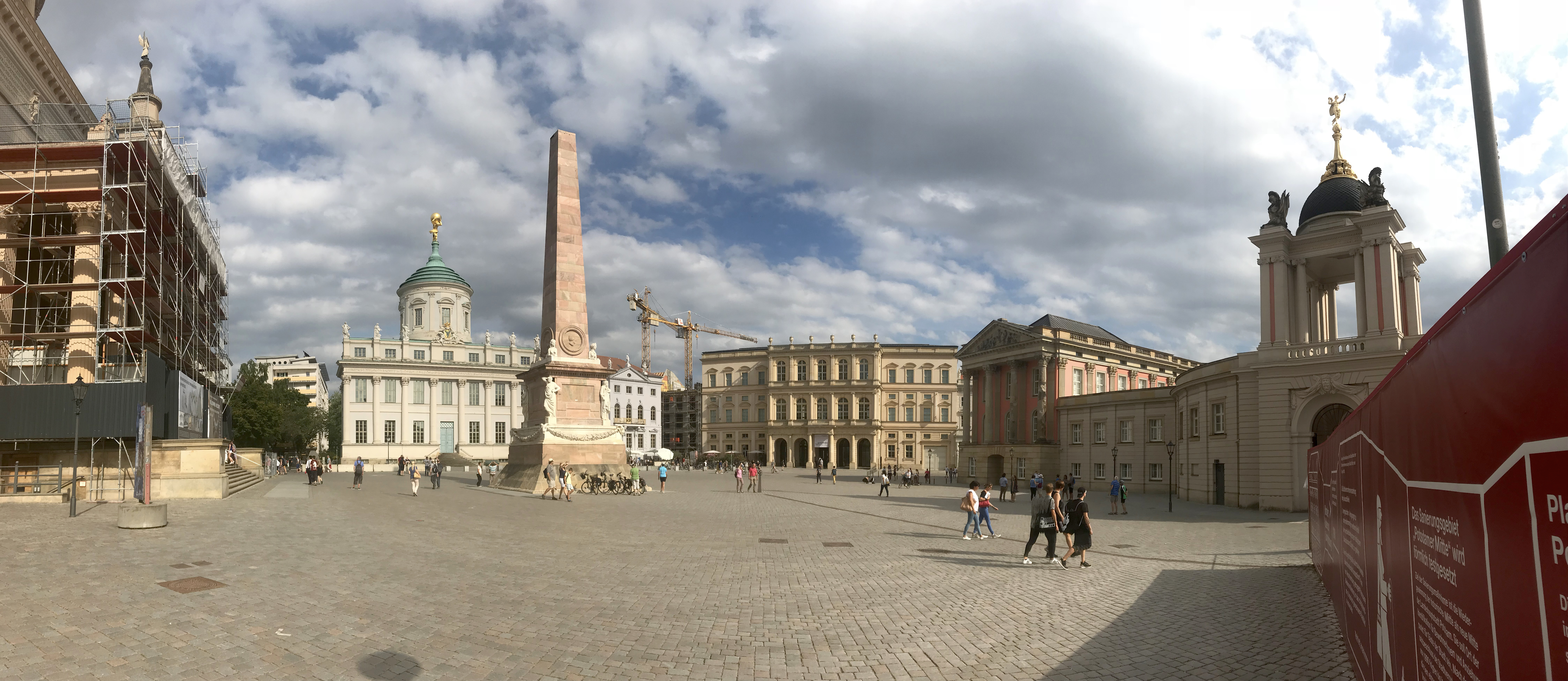 Alter Markt (Potsdam) Südseite